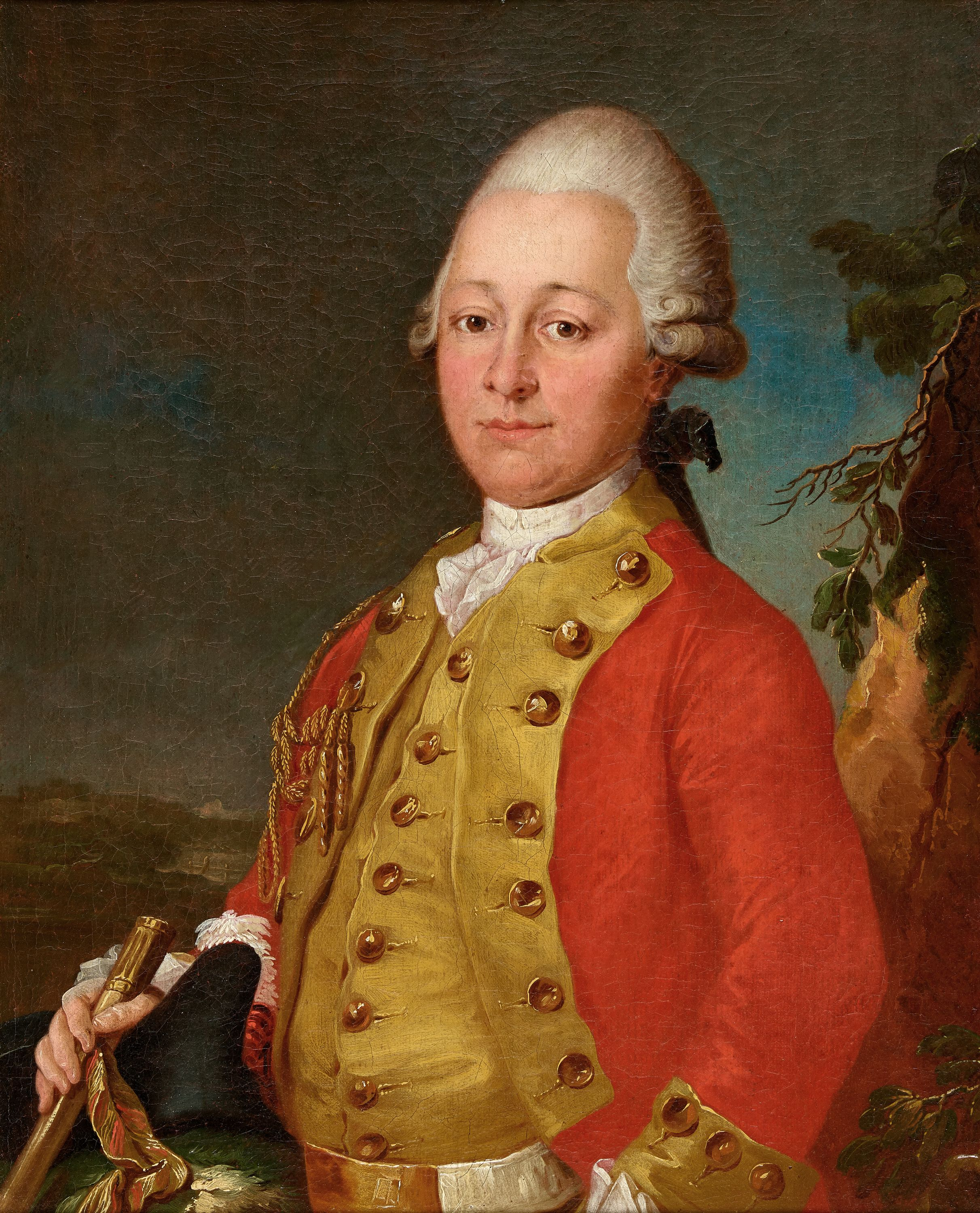 Porträt eines Dragoners der Stadt und Republik Bern aus dem 18. Jahrhundert (Öl auf Leinwand, Privatsammlung Schweiz)